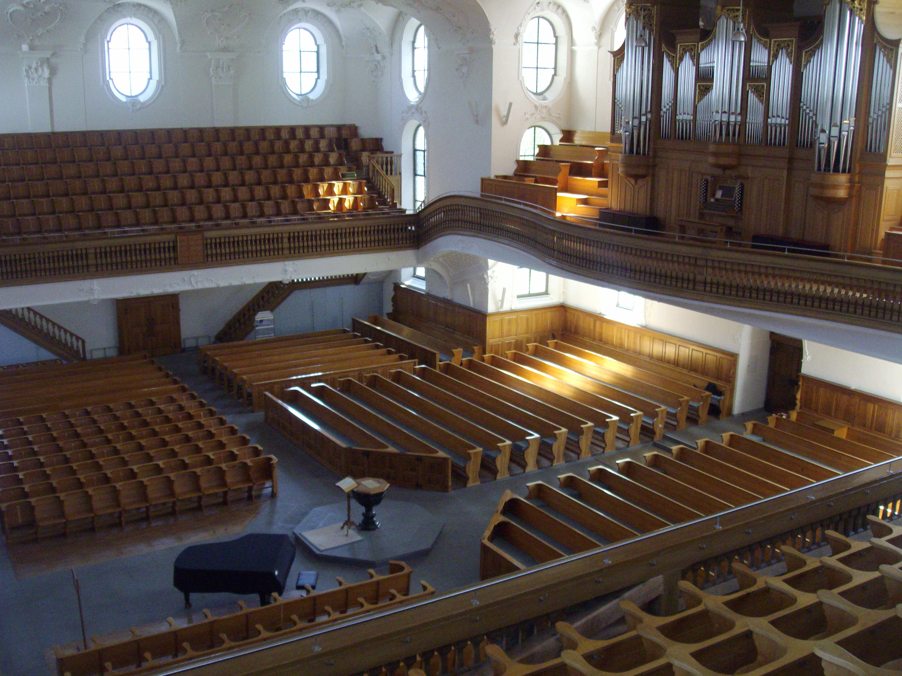 Reformierten Kirche Wädenswil (1764-1767)